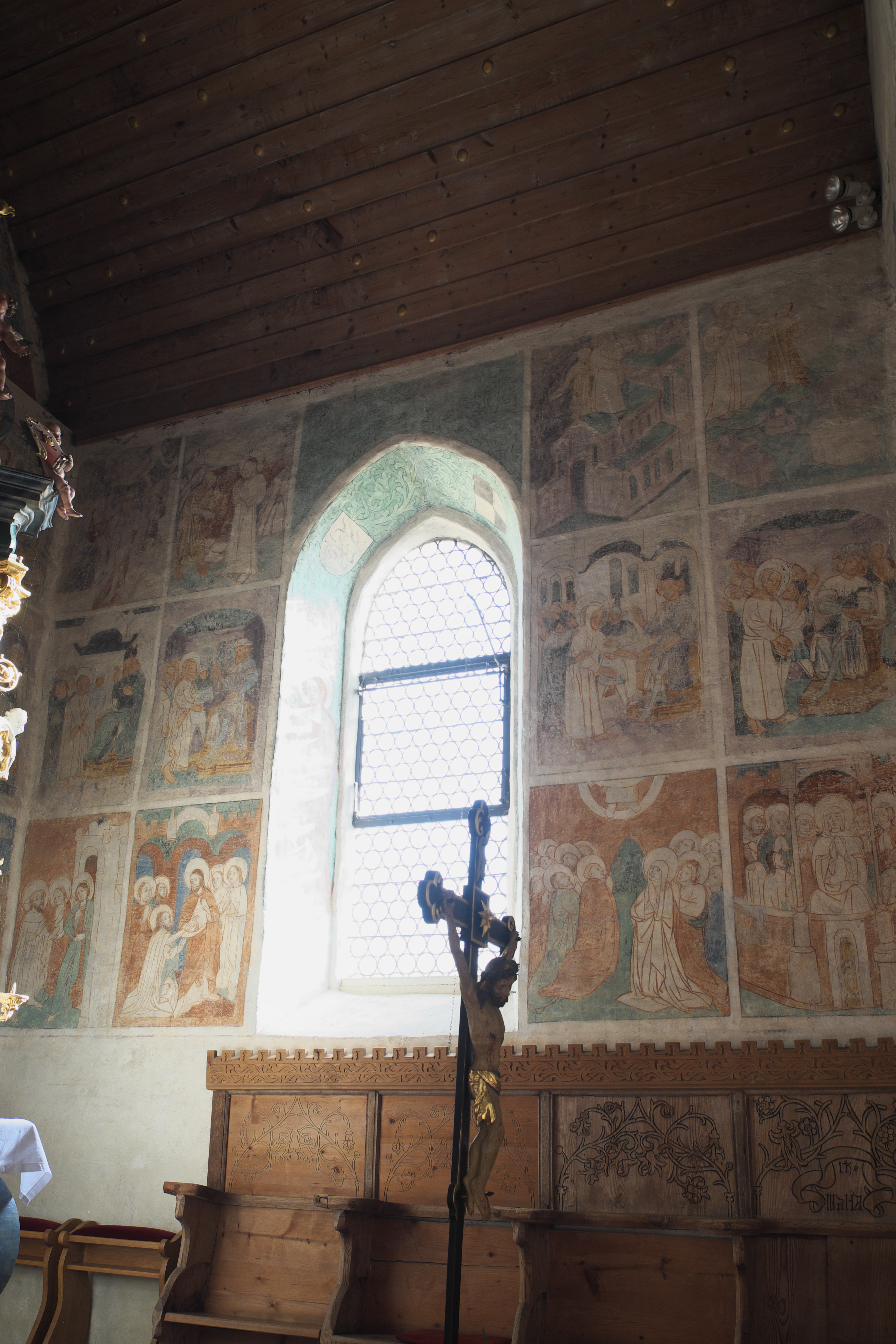 Friedhofskirche, ehemalige Pfarrkirche, St. Gallus in Mühlheim an der Donau im Landkreis Tuttlingen (Baden-Württemberg/Deutschland), Wandmalereien aus der Mitte oder zweiten Hälfte des 15. Jahrhunderts; Darstellungen an der Südwand